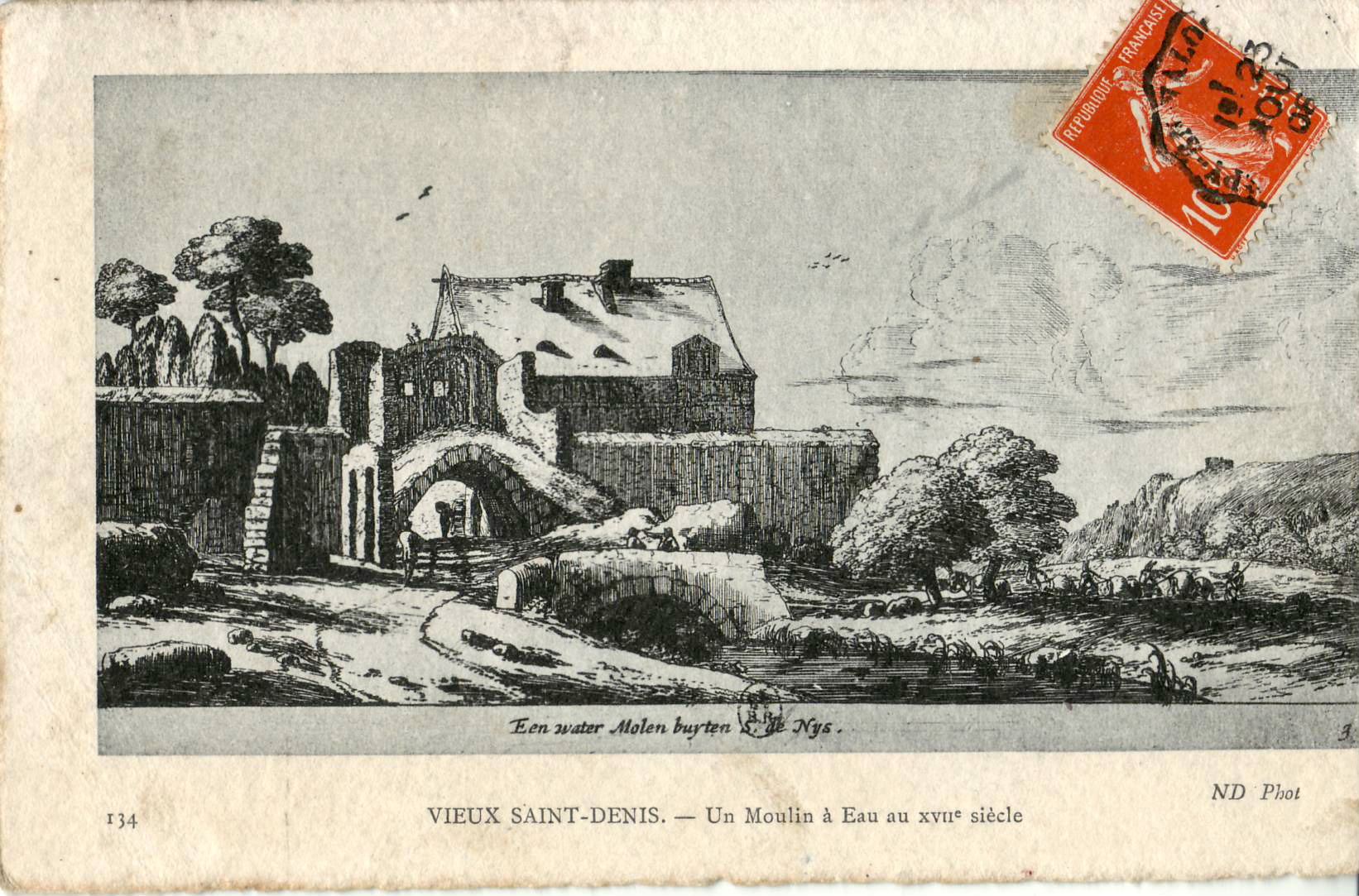 Carte postale ancienne éditée par ND Phot, n°134, reproduisant une gravure ancienne : VIEUX SAINT-DENIS - Un moulin à eau au XVIIe siècle